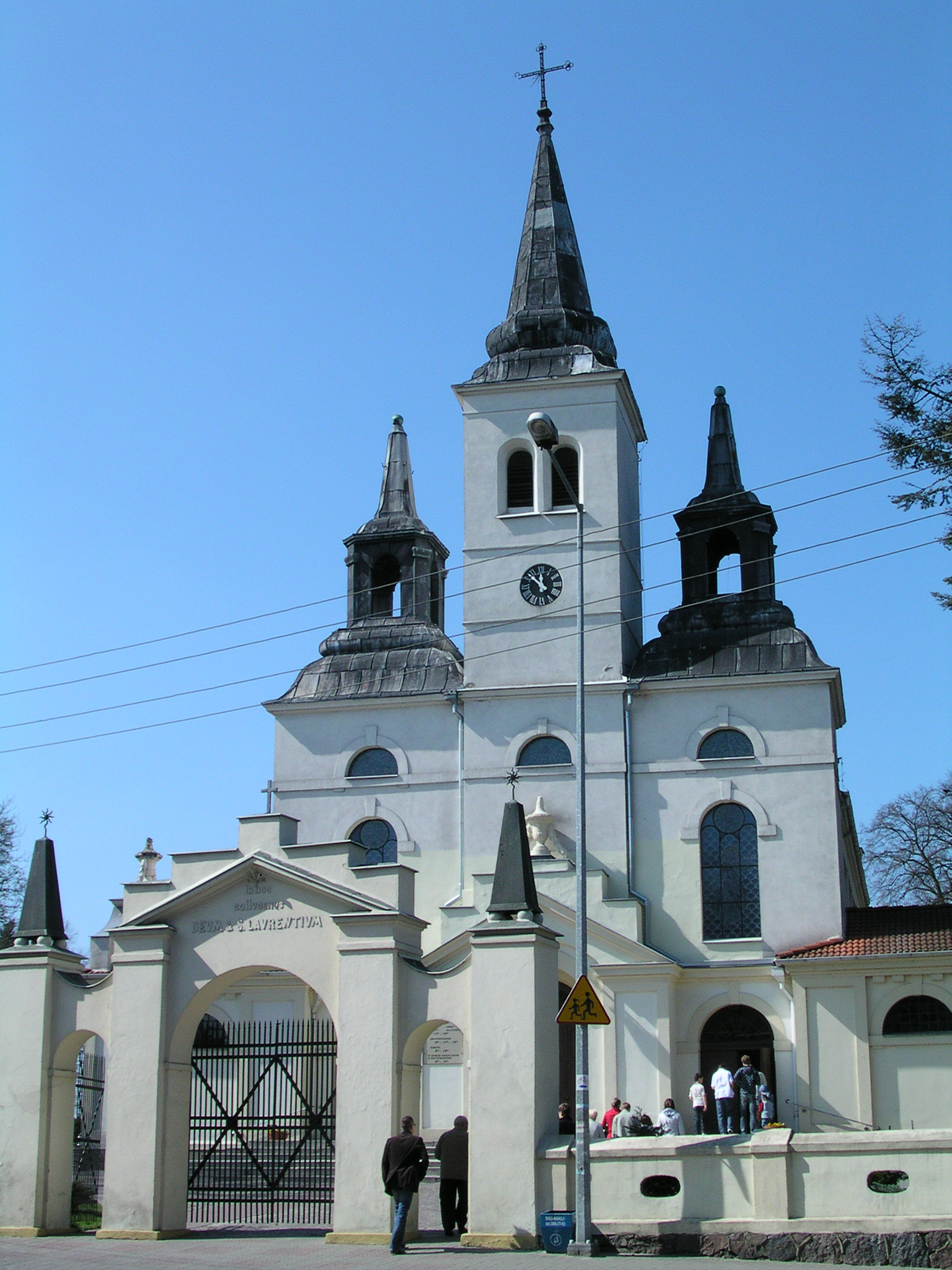 Kościół św Wawrzyńca od przodu